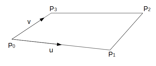 BiliearSurface